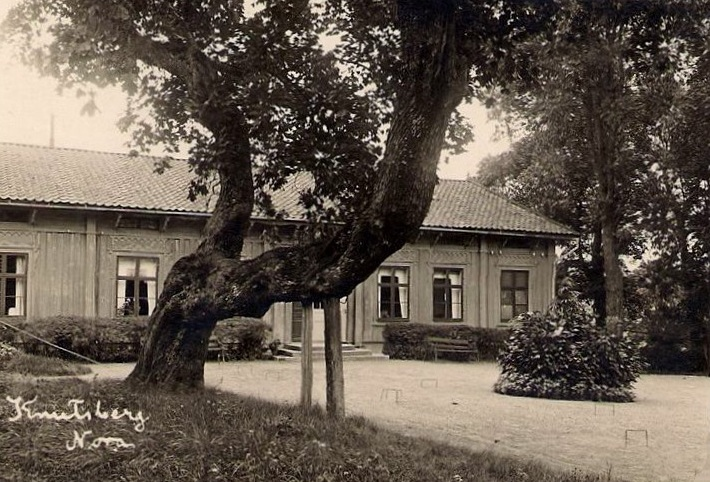 Knutsberg manor in Nora in Sweden